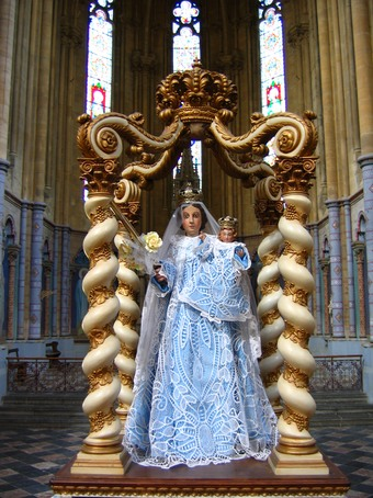 Statue de la Vierge à l'enfant de Notre Dame de Divers-Monts (Ardennes), sur son dais de procession